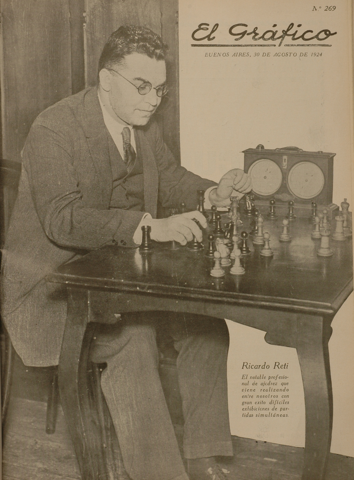 El Grafico del 30 de Agosto de 1924. Edicion 269